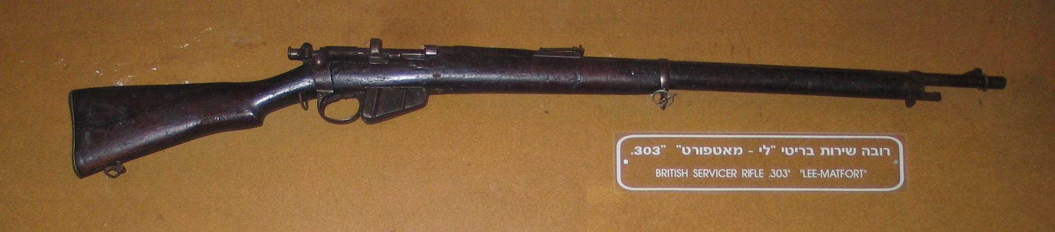 Lee-Metford rifle. Yad Mordechai Museum.